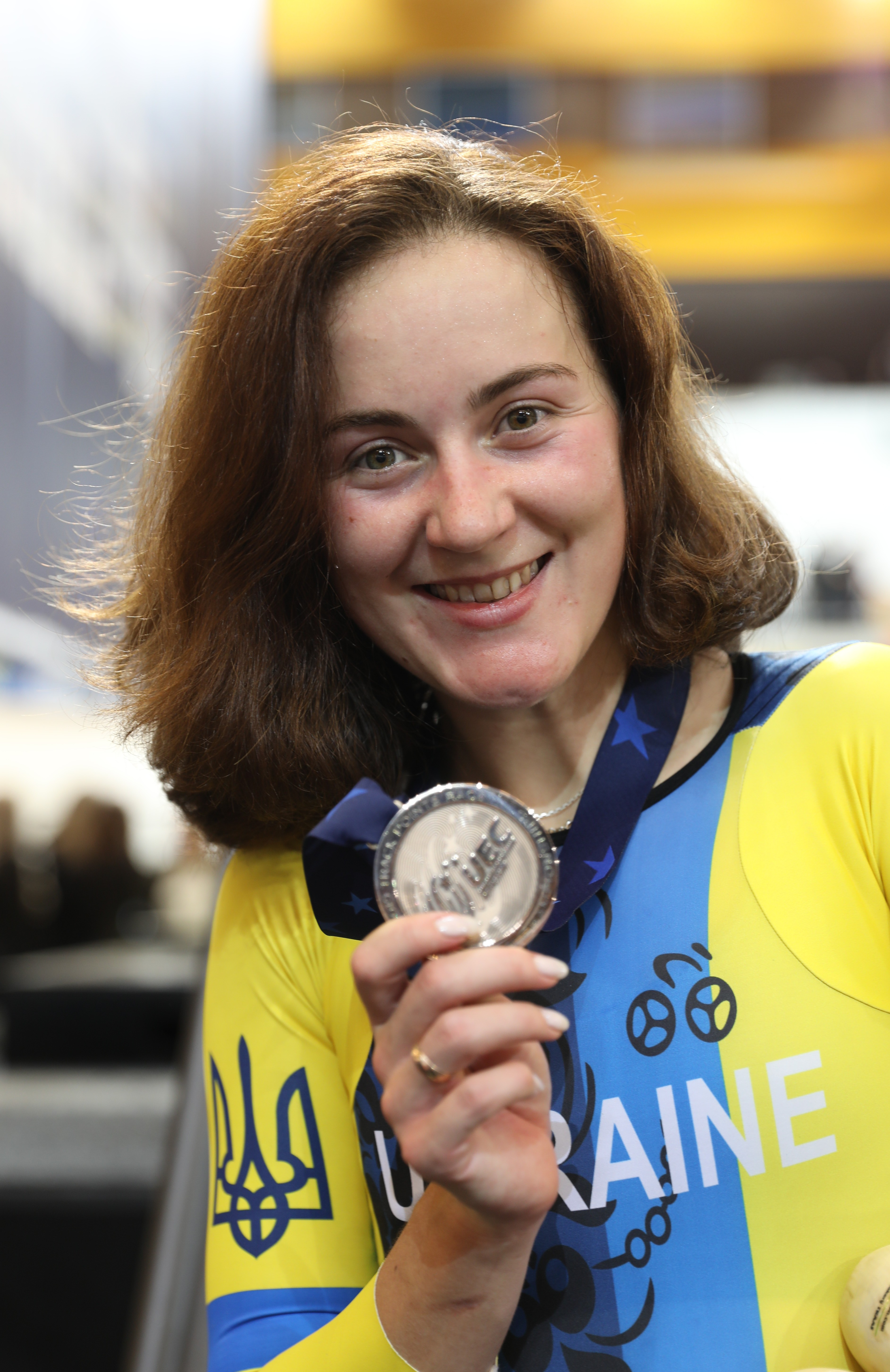 Hanna Solovey, ukrainische Radsportlerin